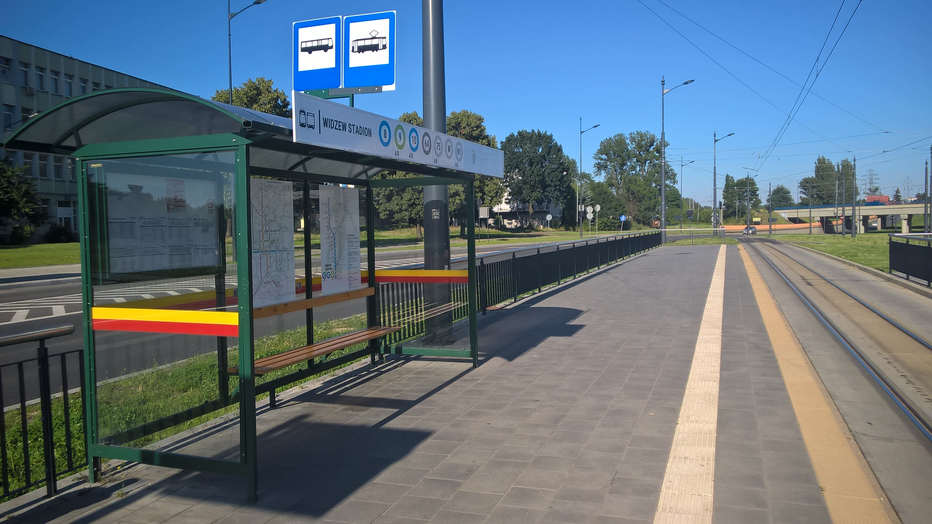 Przystanek tramwajowo-autobusowy komunikacji miejskiej w Łodzi – "Widzew Stadion"